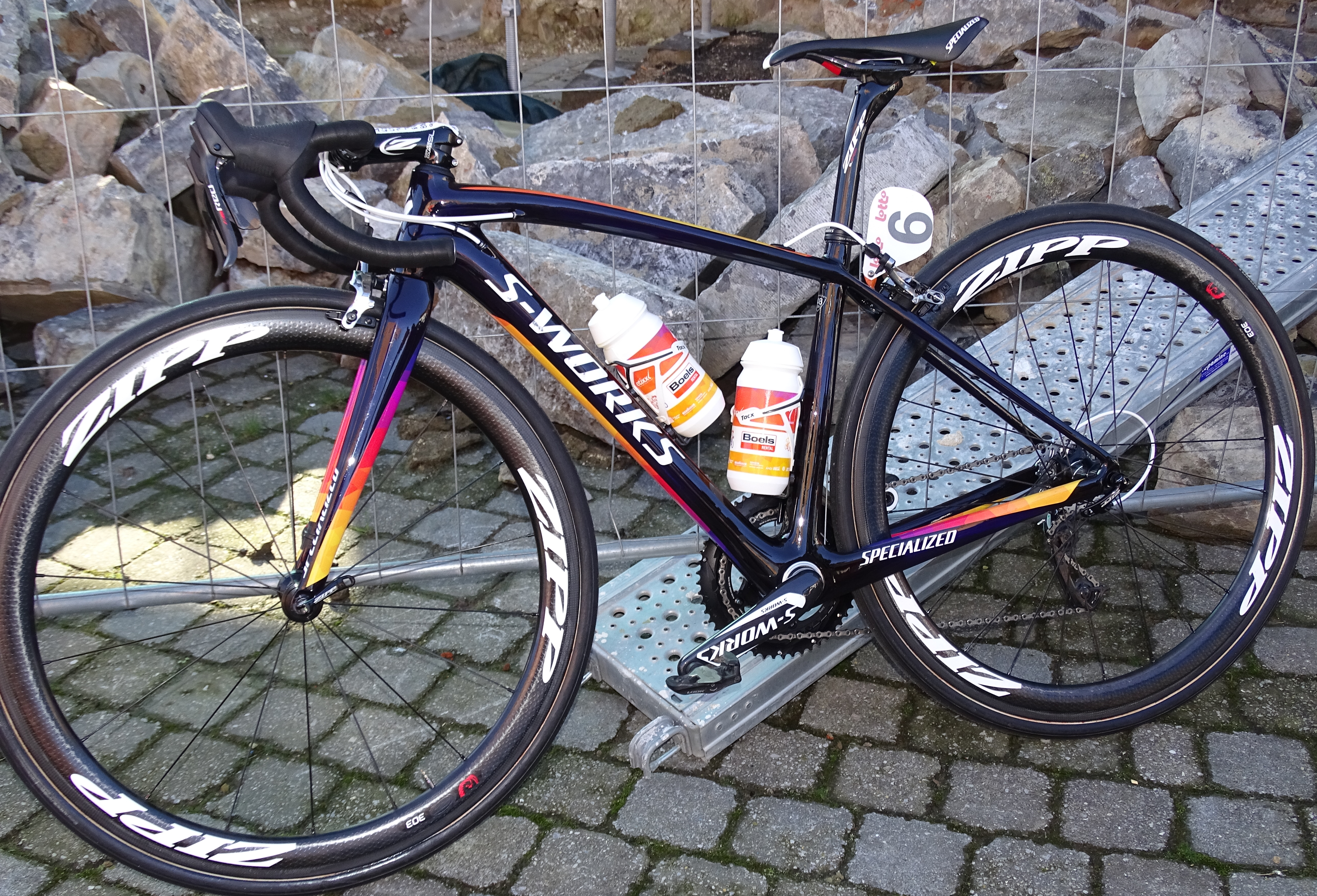 Reportage réalisé le mercredi 2 mars à l'occasion du départ du Samyn des Dames 2016 et du Samyn 2016 à Quaregnon, Belgique.